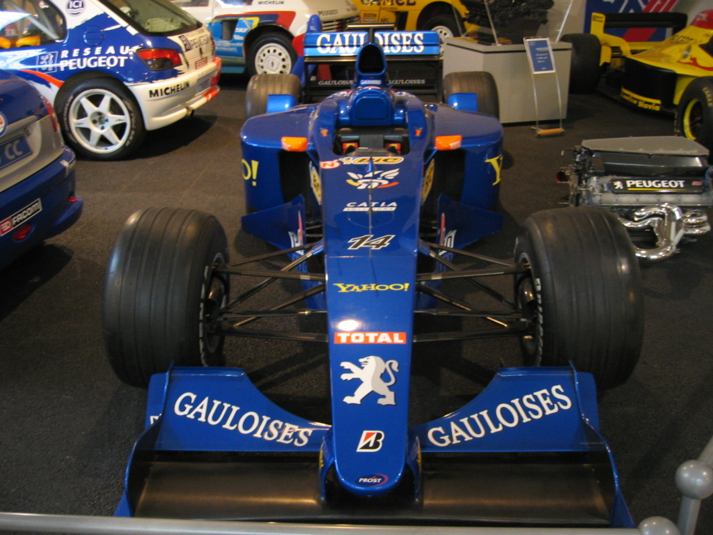 Formule 1 Prost Grand Prix - Musée Peugeot Sochaux